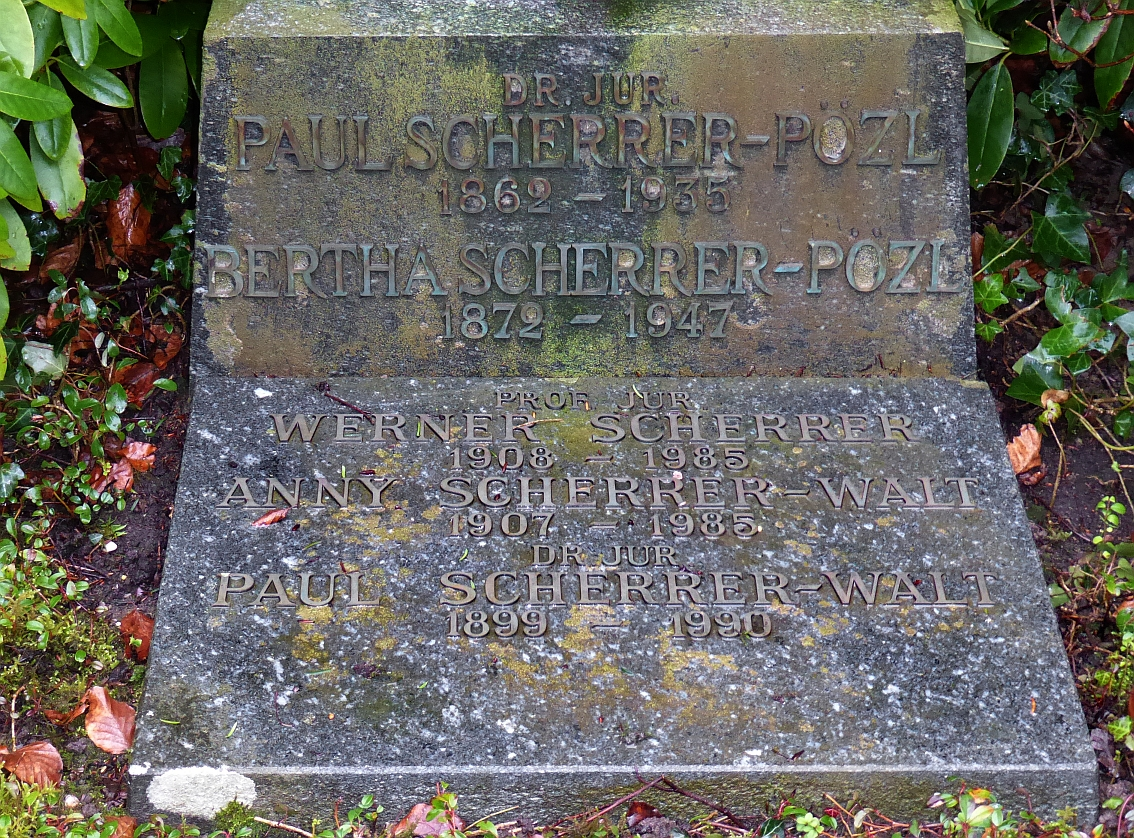 Paul Scherrer-Pözl (1862–1935) Dr.jur., Anwalt, Notar, Politiker, Familiengrab auf dem Friedhof Hörnli, Riehen, Basel-Stadt